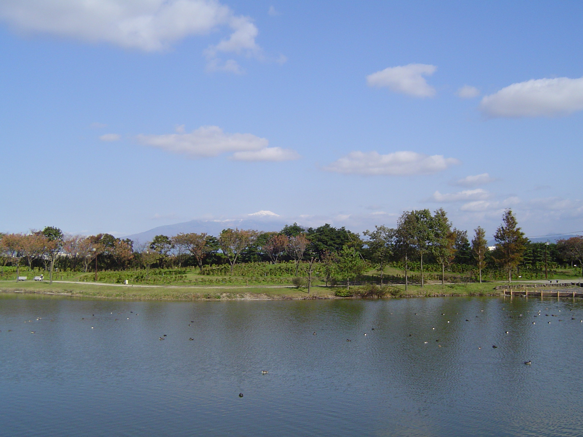 遠くに見えるのが鳥海山